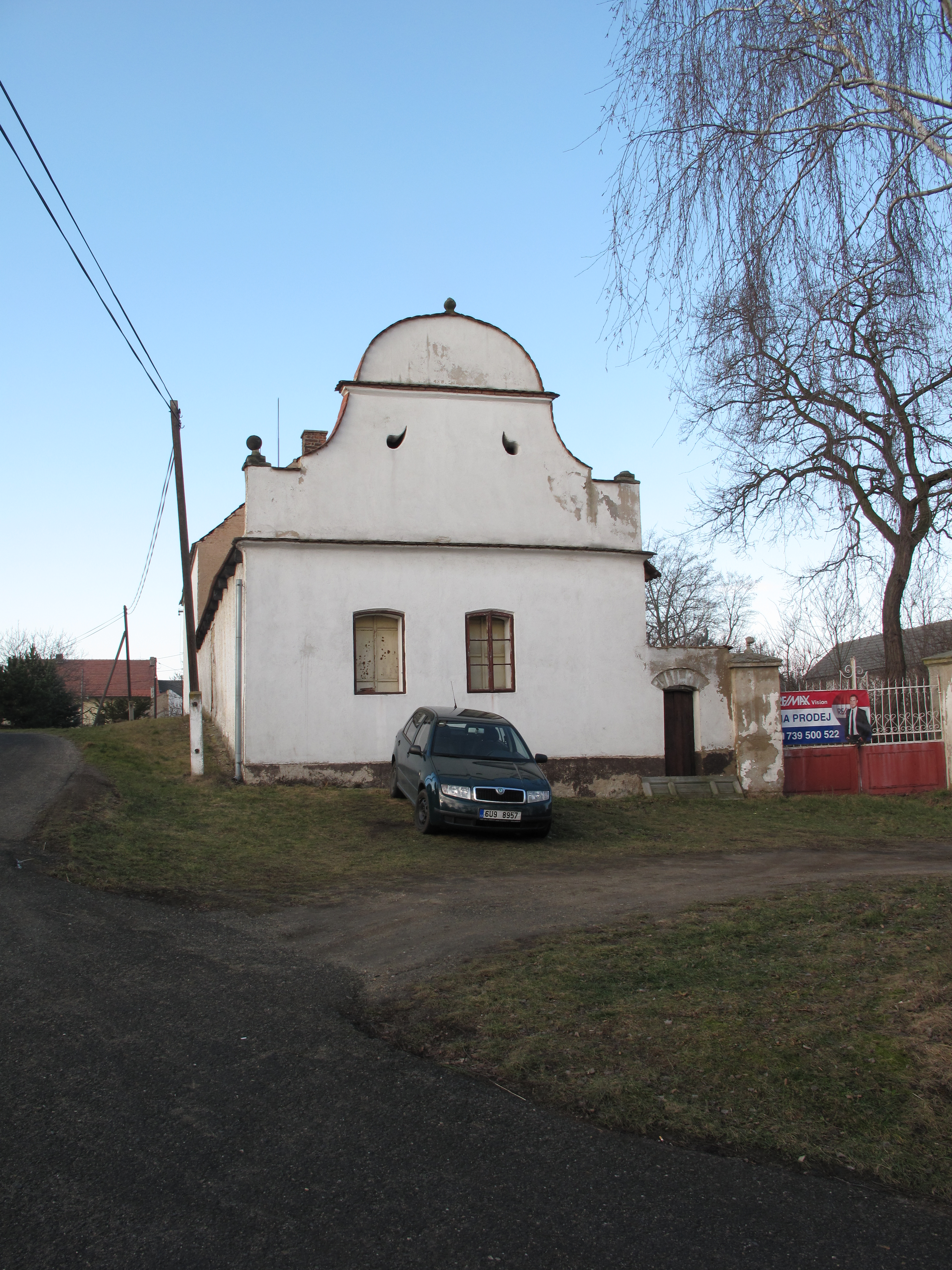 Dům v Dušníkách. Okres Litoměřice, Česká republika.